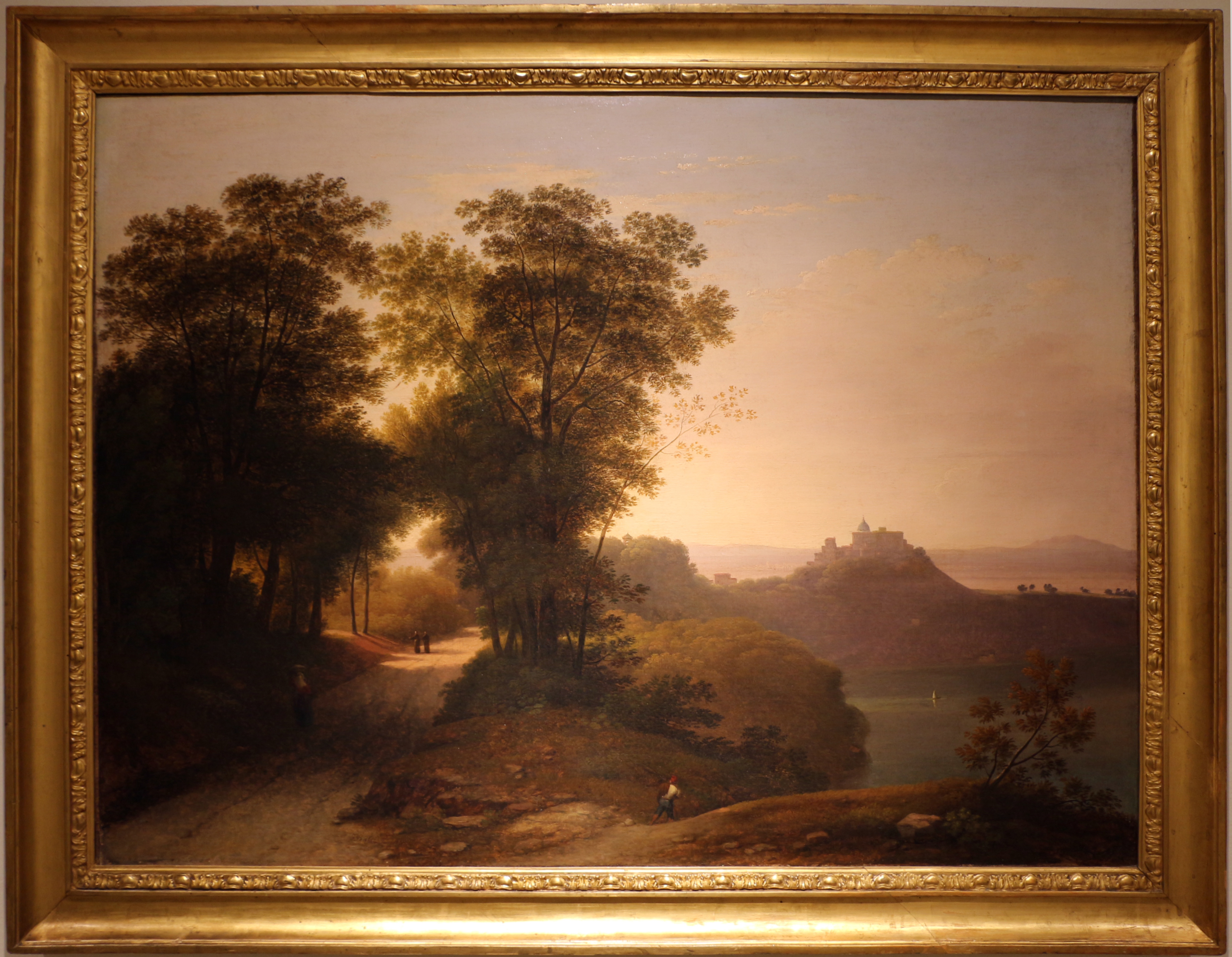 Castel Gandolfolabel QS:Len,"Castel Gandolfo" label QS:Lde,"Castel Gandolfo" label QS:Lit,"Castel Gandolfo"